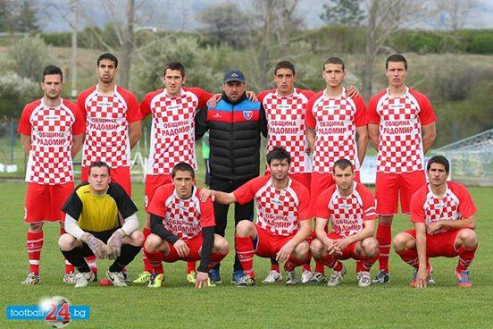 Първи отбор.